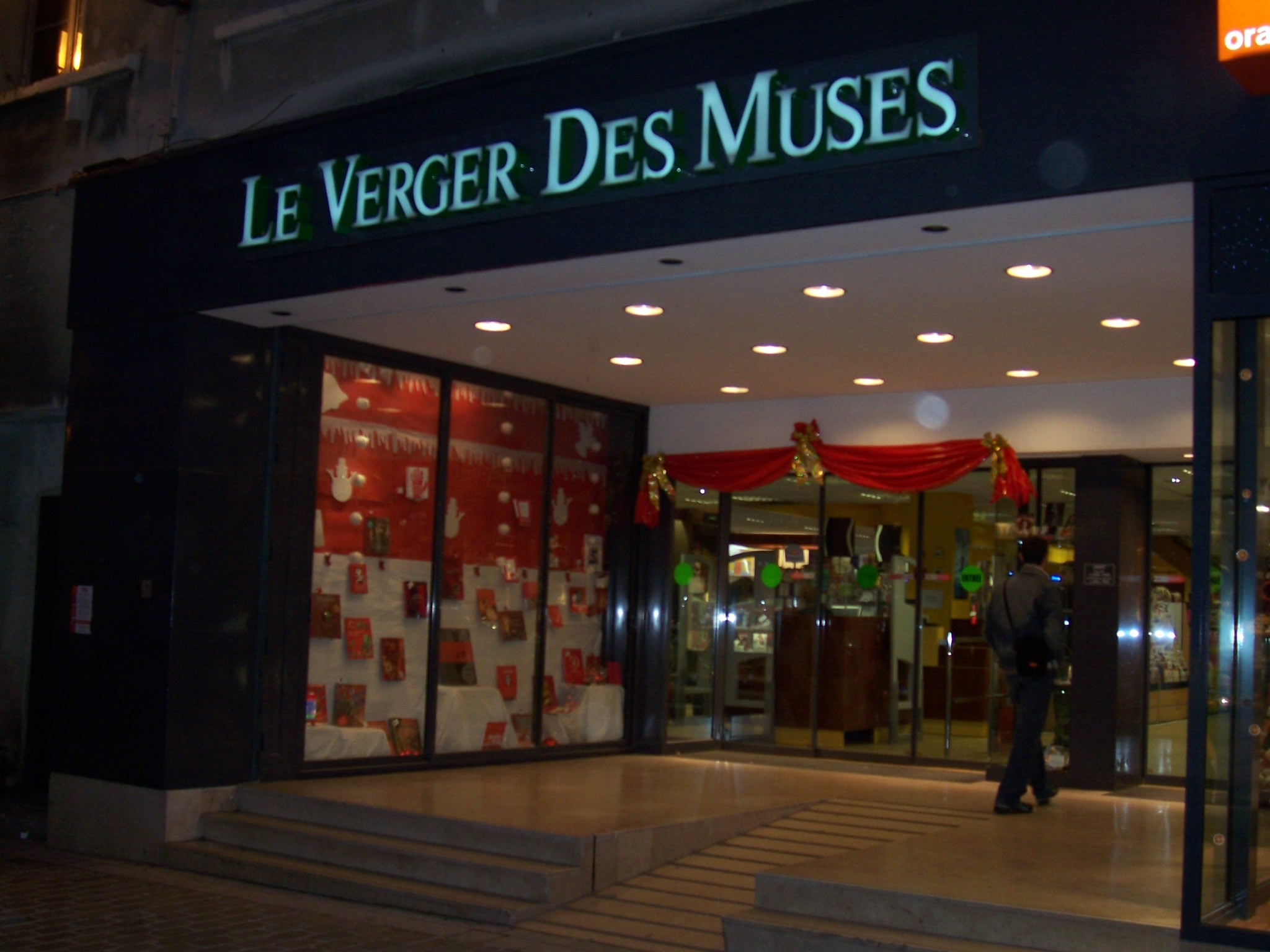 Librairie "Le Verger des Muses" à Bourg-la-Reine (Hauts-de-Seine, France).